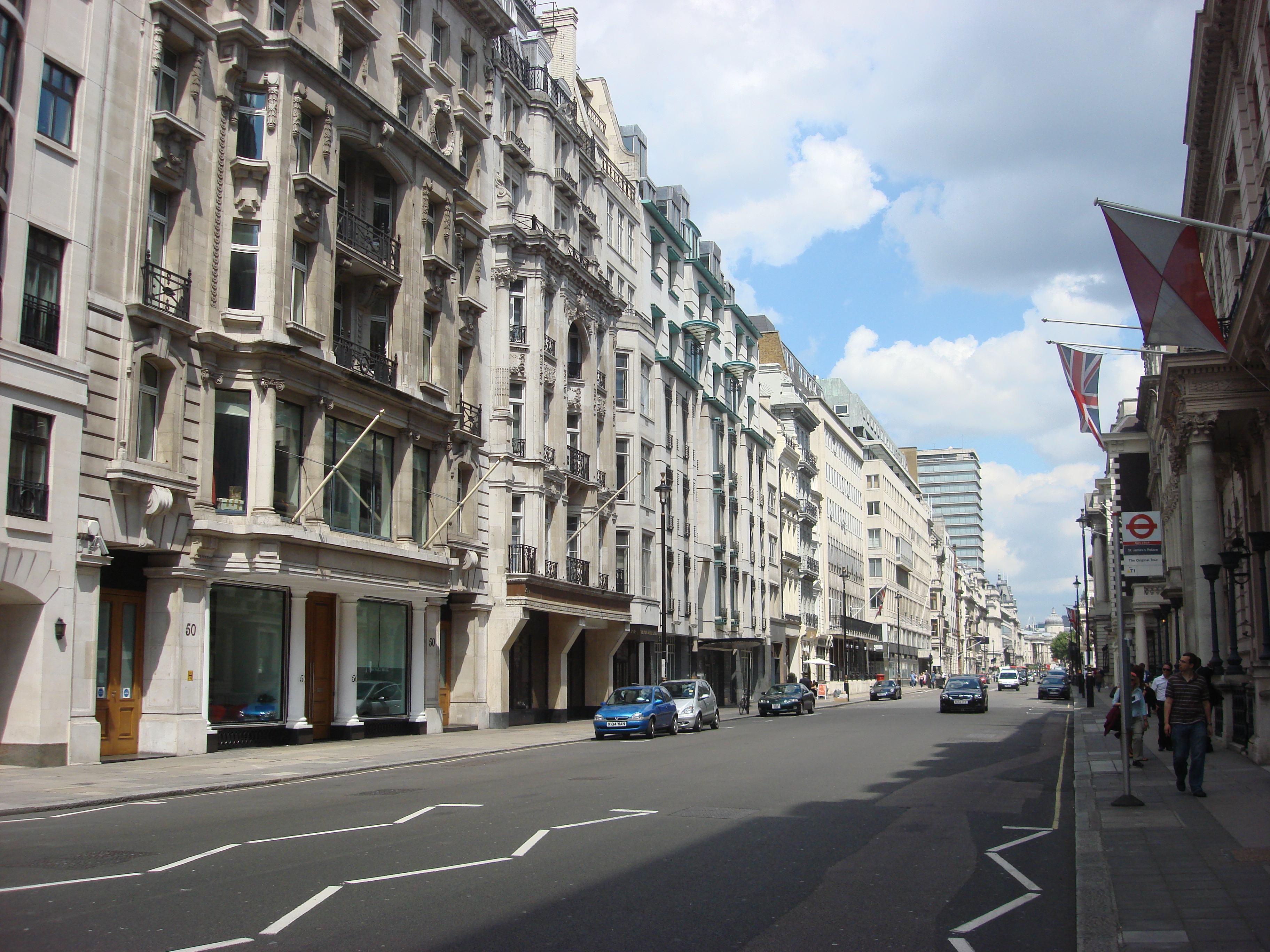 Pall Mall